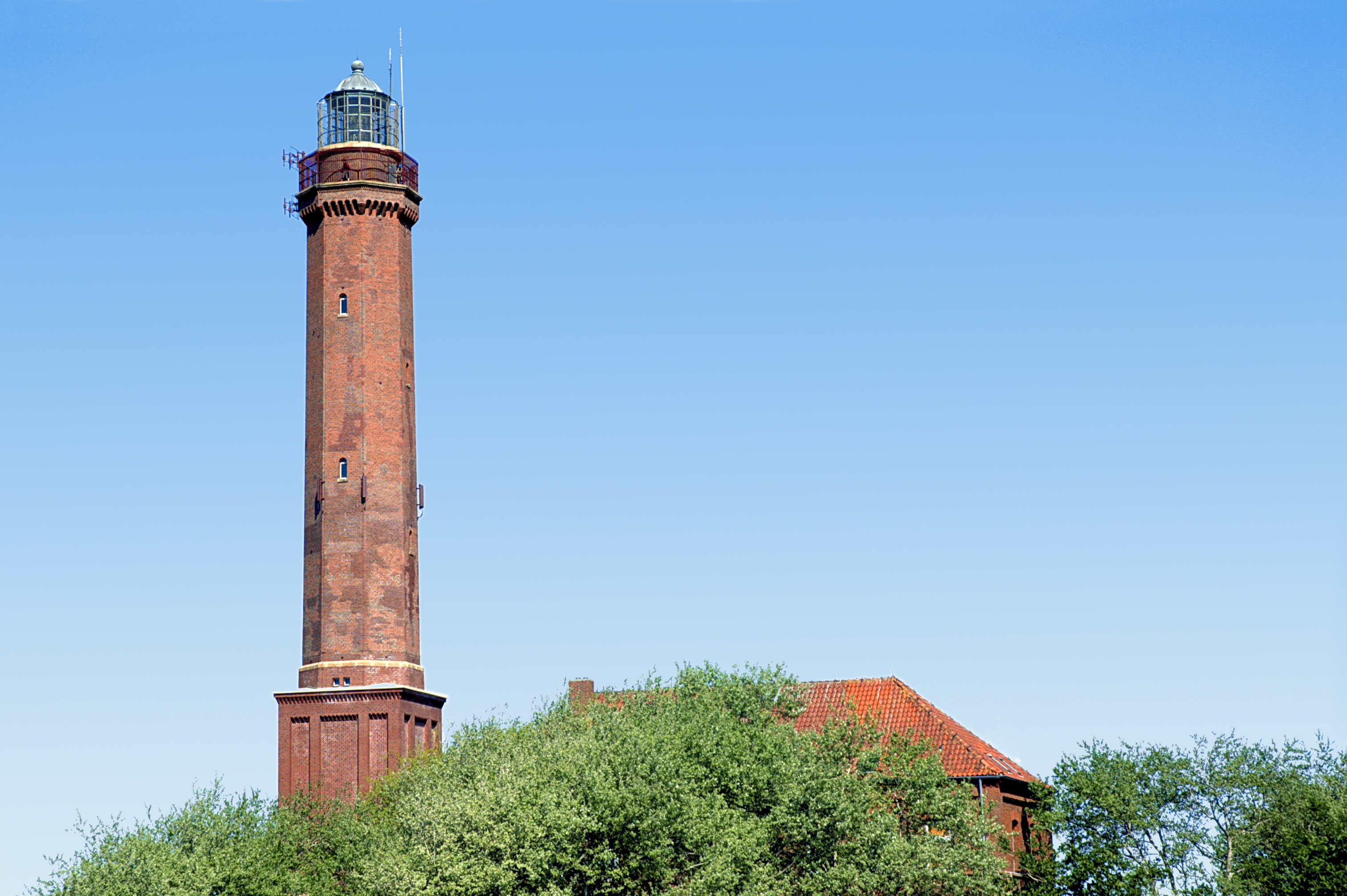 Leuchtturm Norderney 2007